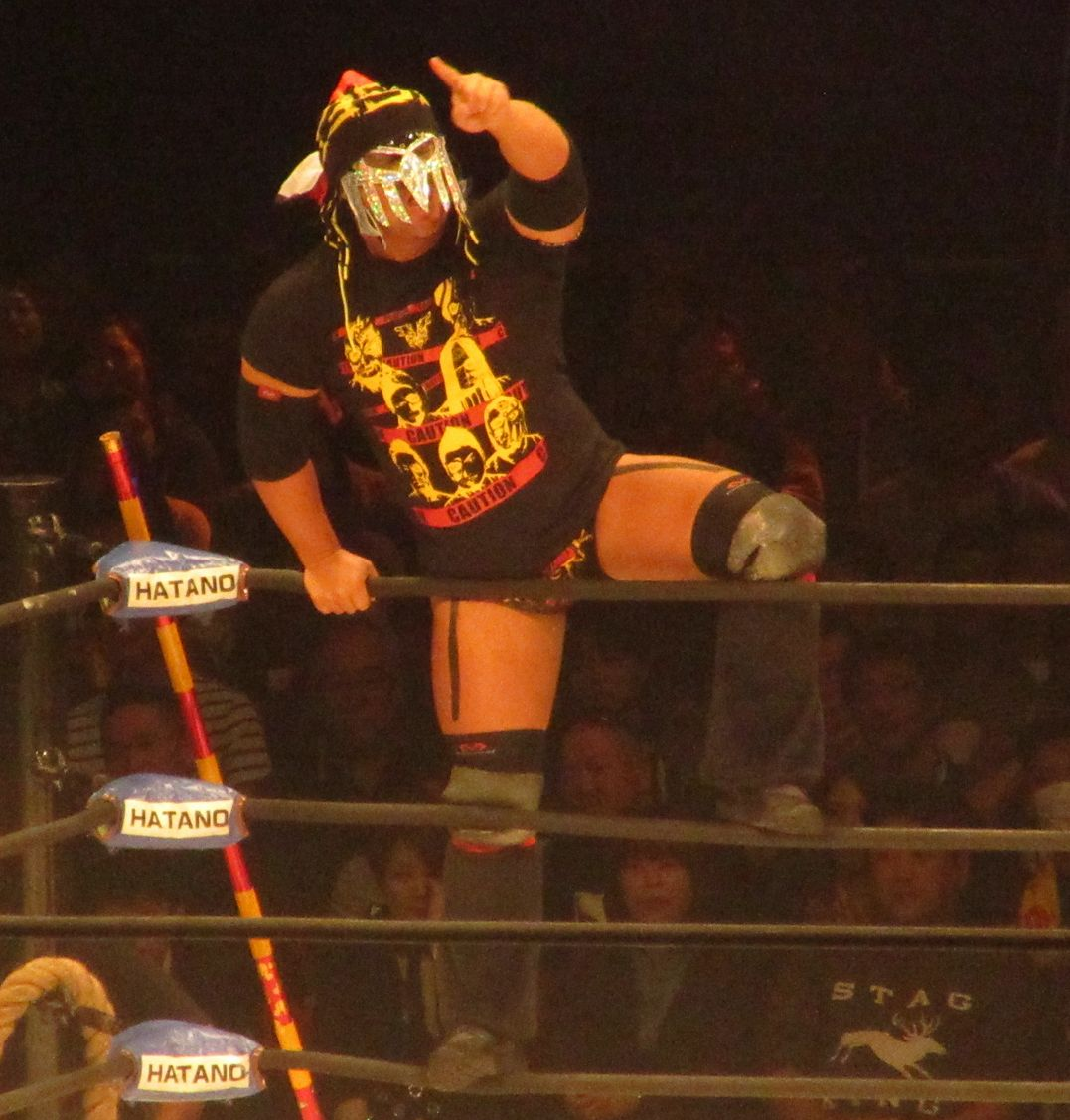 2016.11.3大阪